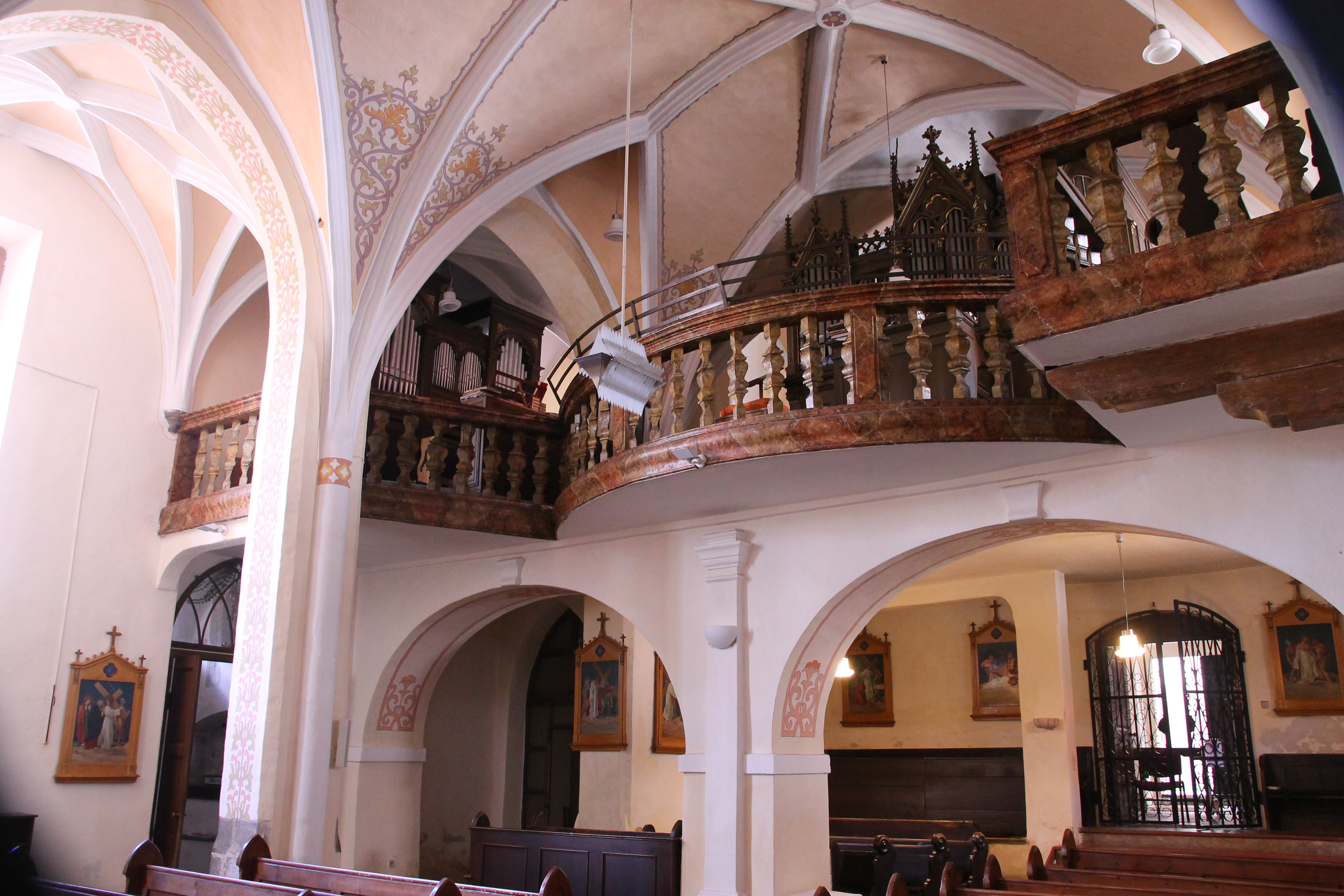 kůr kostel